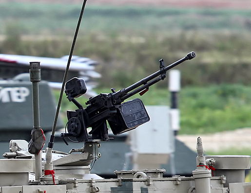 QJC88式12.7mm车载高射机枪